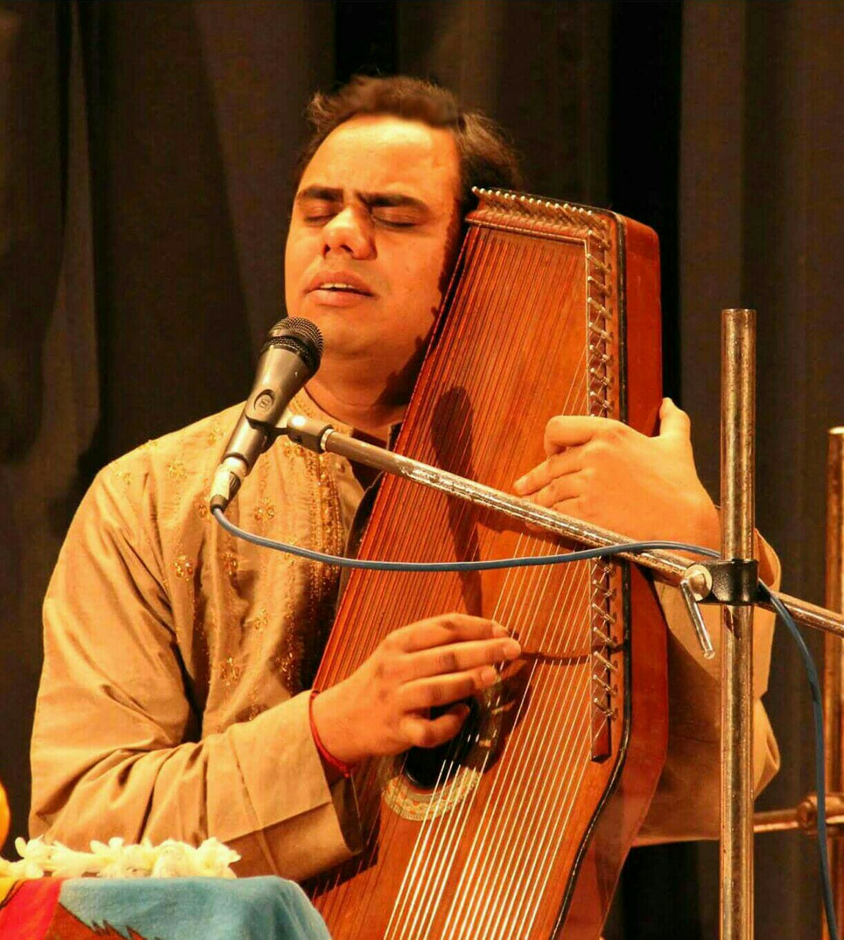 Pt. Shyam Sundar Goswami performing at Rotary Sadan in April 2012